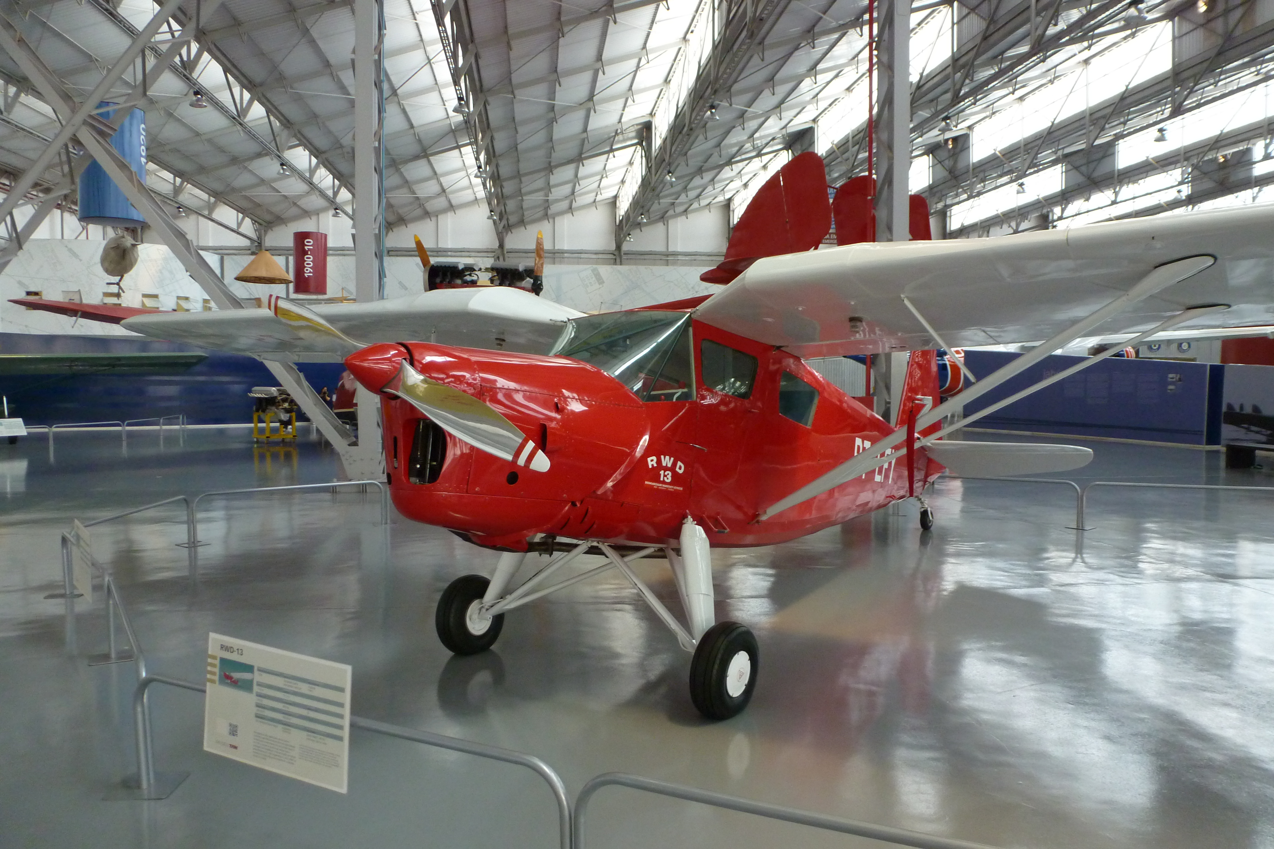 RWD 13 - Visita ao Museu da TAM, em São Carlos, no Brasil.